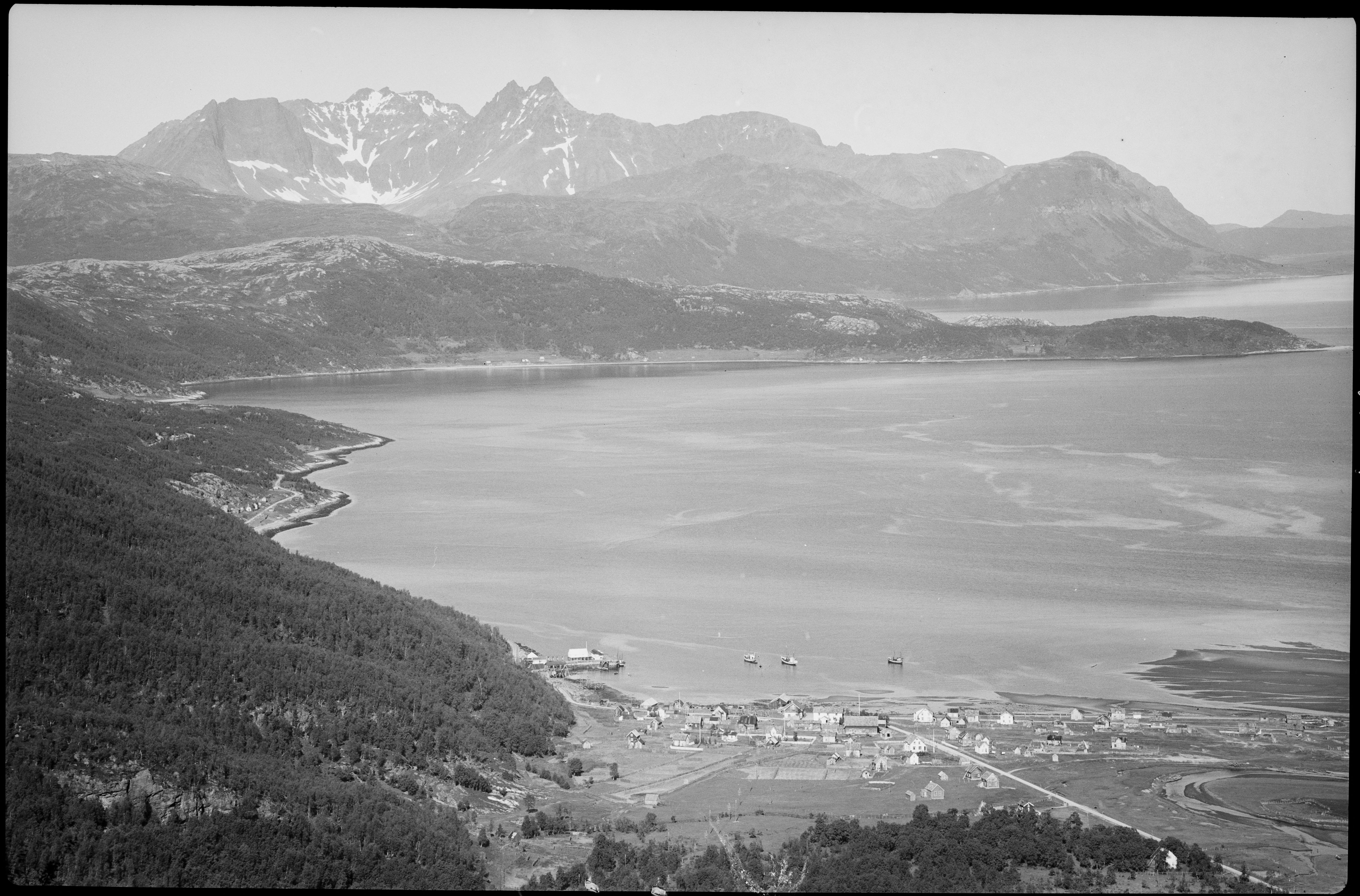 Bildet er hentet fra Nasjonalbibliotekets bildesamling. Anmerkninger til bildet var: Fotograf: L. S. (gammelt bilde) Sørkjosen, Nordreisa, Troms . Also Sokkelvika.